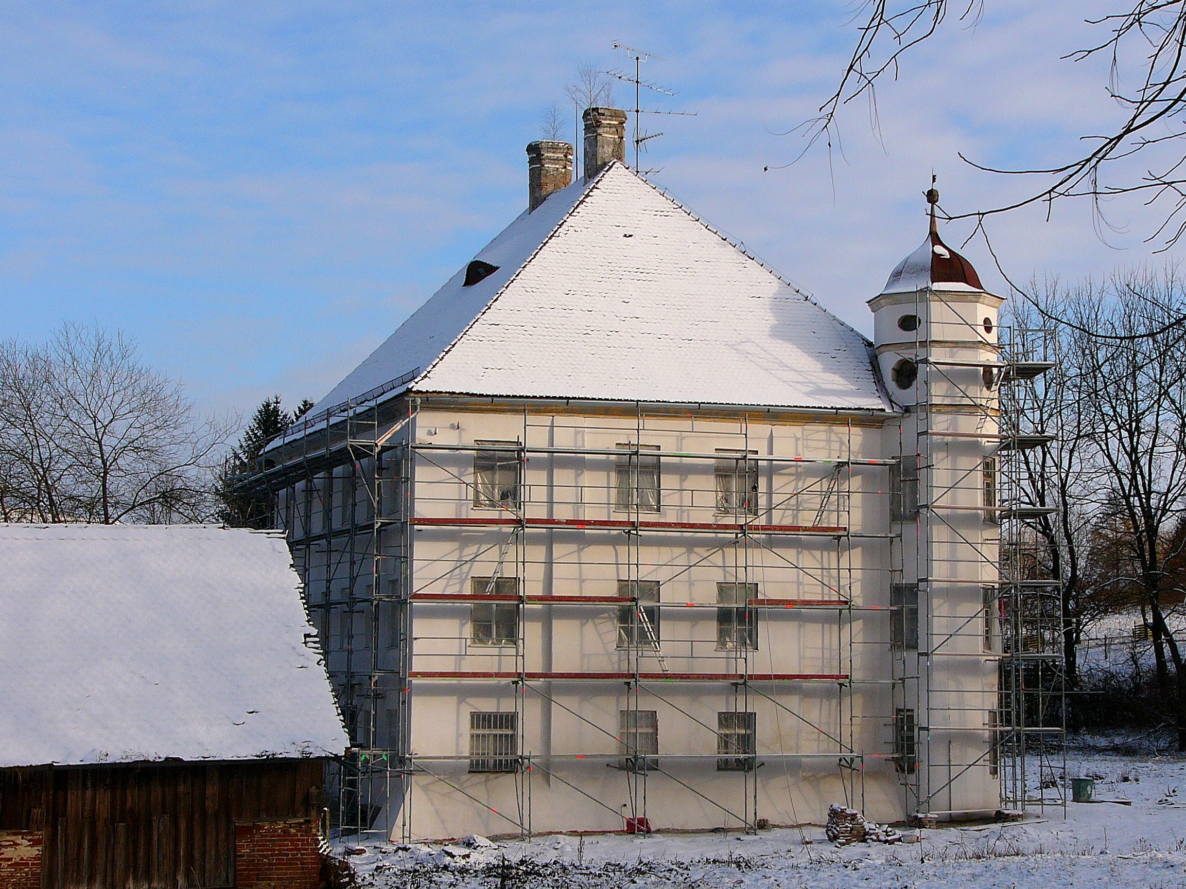 Schloss; dreigeschossiges Gebäude mit Walmdach, an der Südseite zwei runde, im Oberbau oktogonale Ecktürmchen mit welschen Hauben, Spätrenaissance, Anfang 17. Jahrhundert; mit Ausstattung; flankierende Nebengebäude, eingeschossige Ziegelsteinbauten mit Satteldach, 18./19. Jahrhundert; erhaltene Gebäude des ehem. dreiflügeligen Wirtschaftshofs, Nord- und Ostflügel, Ziegelsteinbauten mit Satteldach, 18./19. Jahrhundert. This is a photograph of an architectural monument.